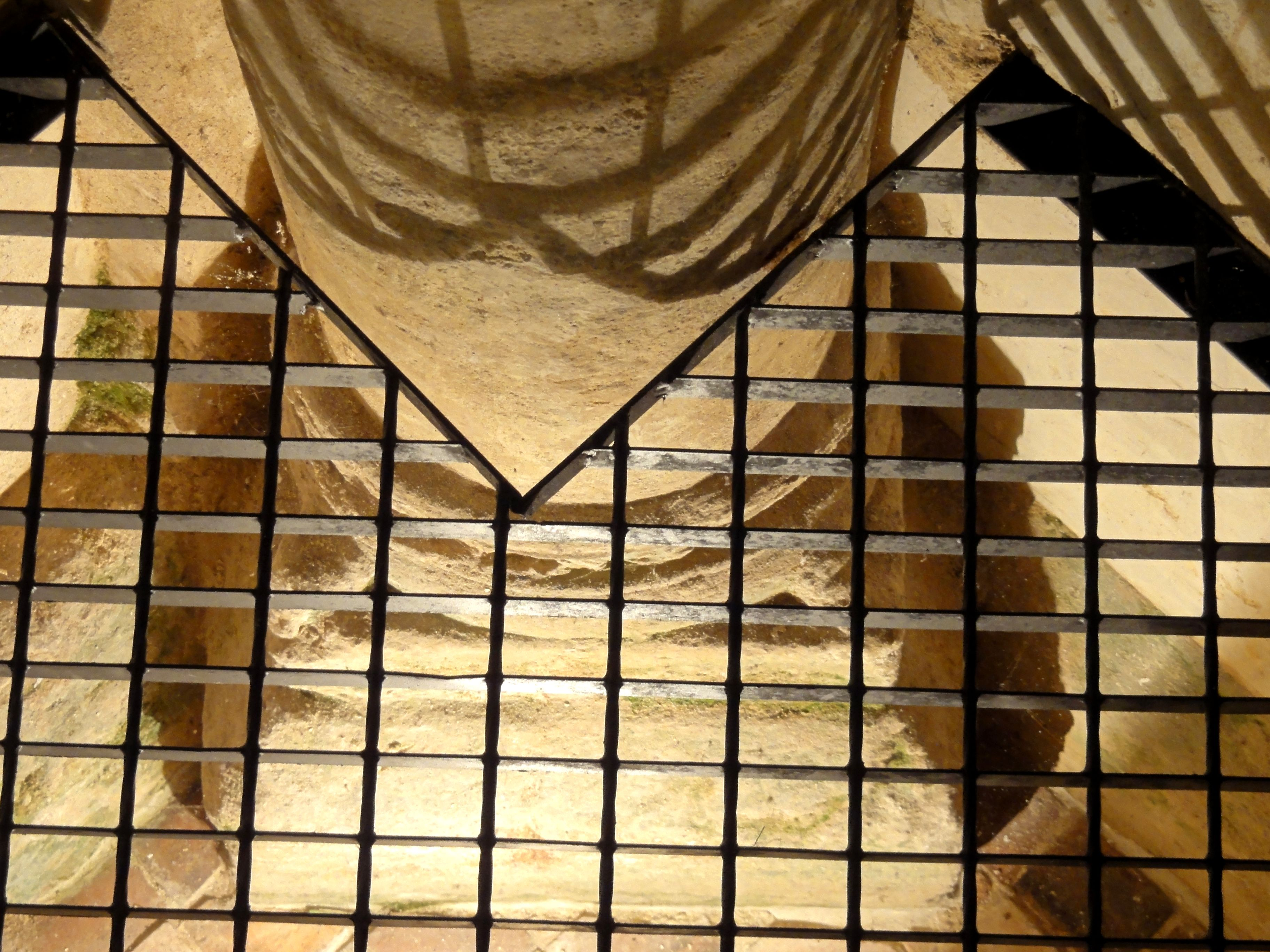 Base de la colonne dans l'angle sud-est du croisillon sud : le sol a été considérablement remblayé, faisant disparaître toutes les bases de colonnes.